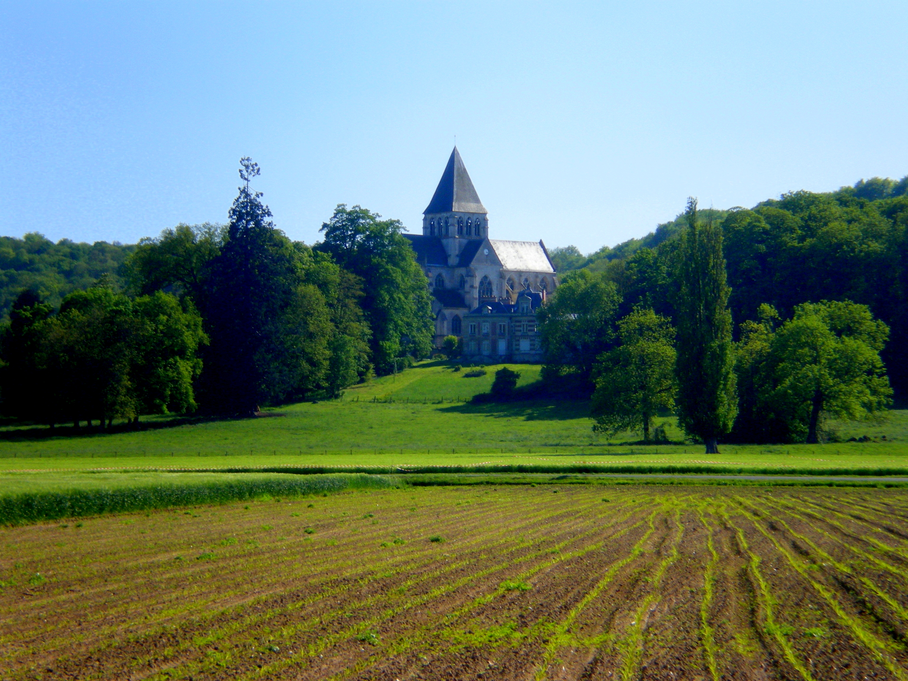 L'église Saint-Léger d'Agnetz depuis les champs.